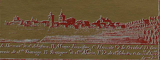 grabados_sVIII